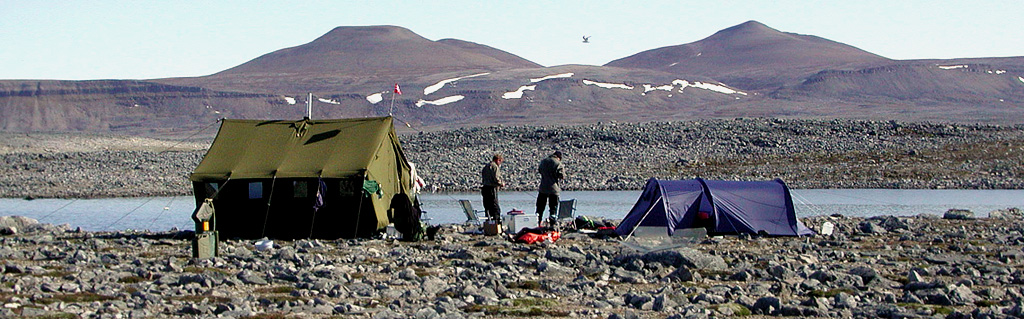 Røyeforskere på Bjørnøya. Miseryfjellet i bakgrunnen.